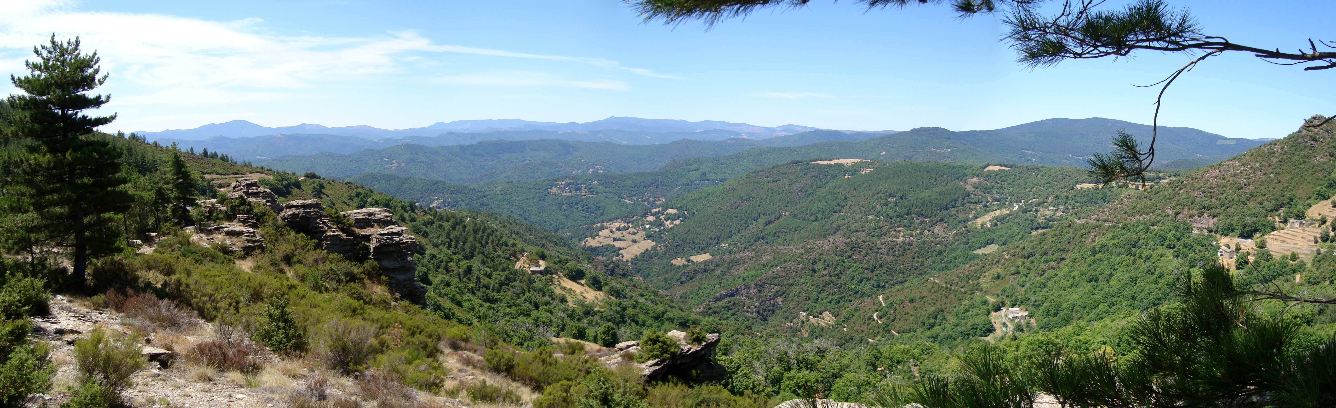 Panorama depuis le col de Prentigarde dans les Cévennes en Lozère.